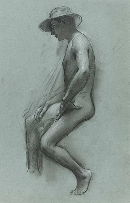 Adolf Hirschl, Étude pour Hermès (1898).